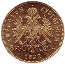 8 Guldenstück mit Doppeladler - Gravur Revers von Franz Gaul (1802-1872) 8 Gulden = 20 Francs Österreich-Ungarn Franz Joseph I. (1848-1916) Prägezeit: 1892 Münzstätte: Wien Entwurf: Josef Tautenhayn (Vs) / Franz Gaul (Rs) .900 Gold Gew.: 6,45 g; Durchmesser.: 21 mm